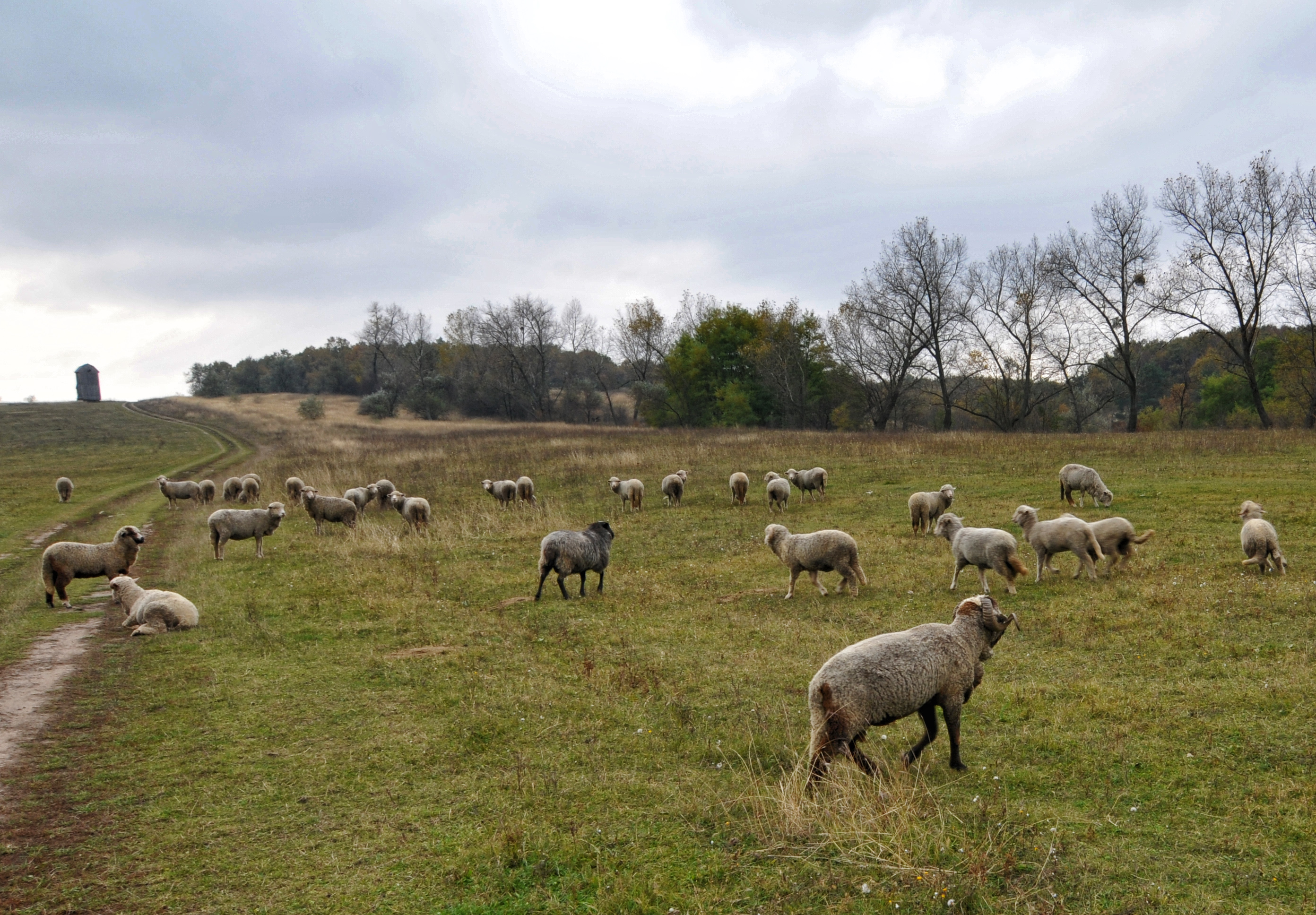 Урочище "Сухі Колодки" поблизу с.Стецівка Чигиринського р-ну